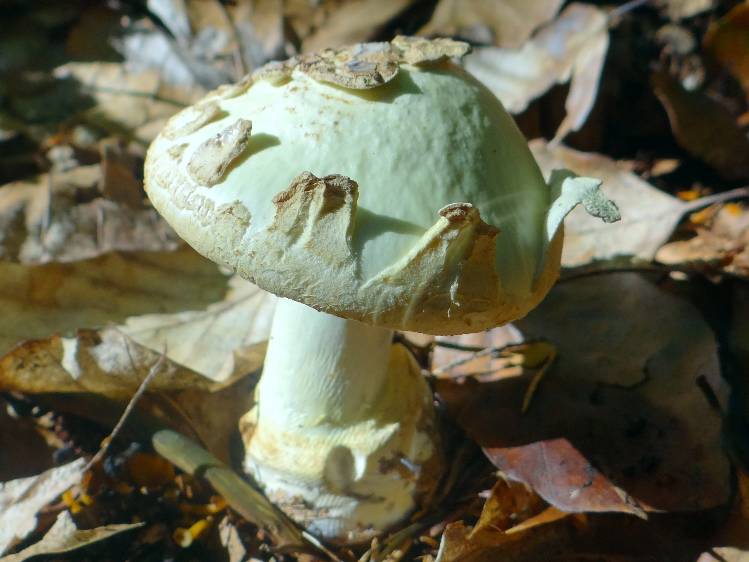 Amanita citrina